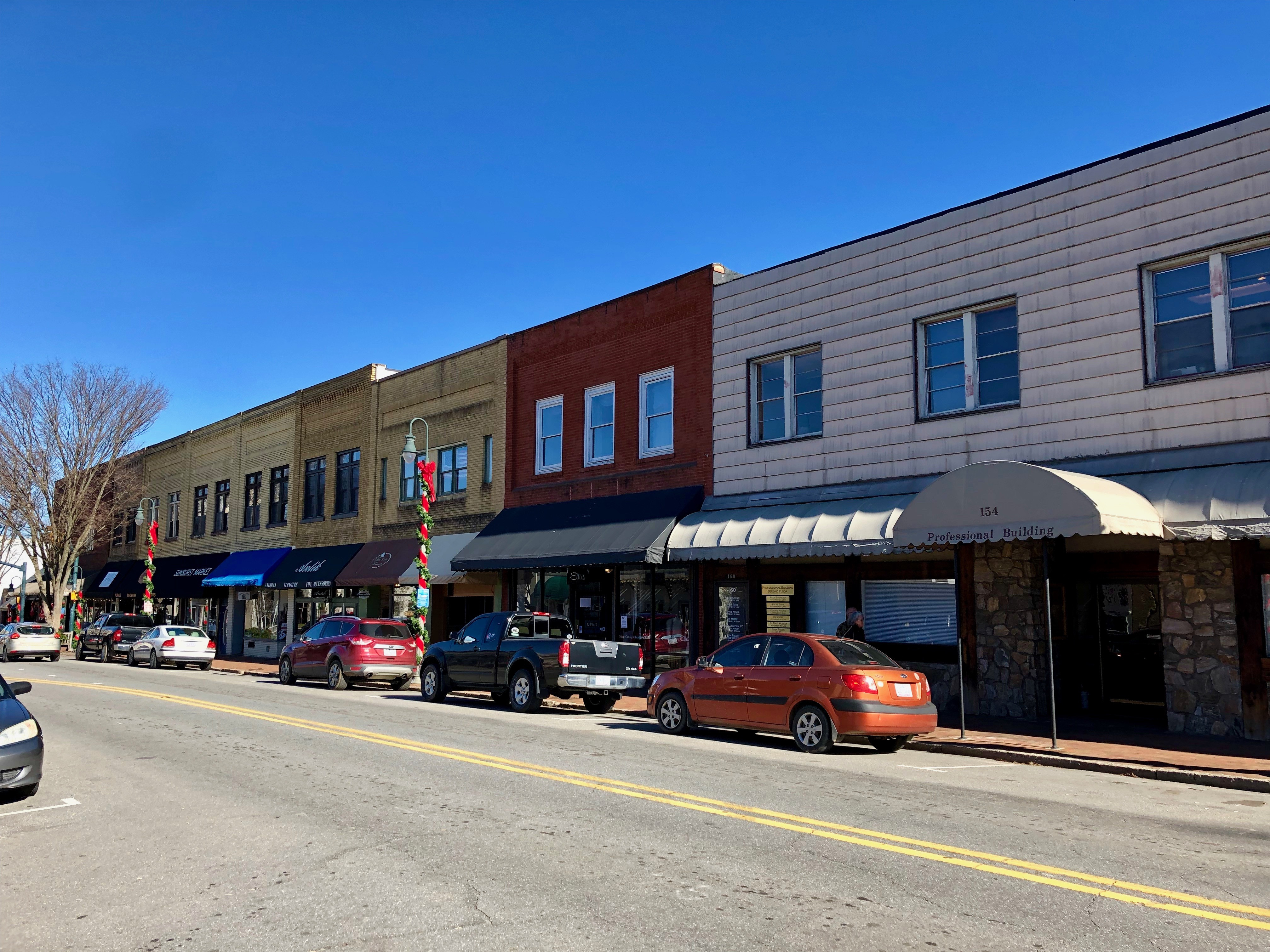 Main Street, Waynesville, NC